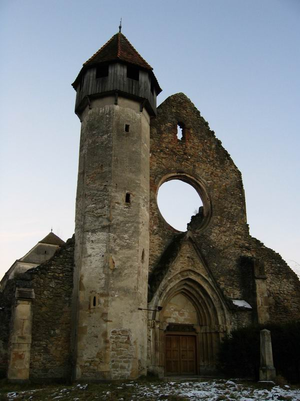 Kloster Cârţa